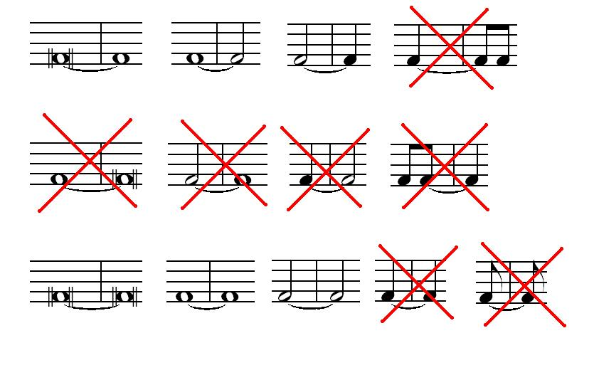 Noodinäide selle kohta, milliste rütmivältuste vahelised pided on range kontrapunkti reeglite alusel lubatud. Kasutatud on programme Finale 2005 ja MS Paint.